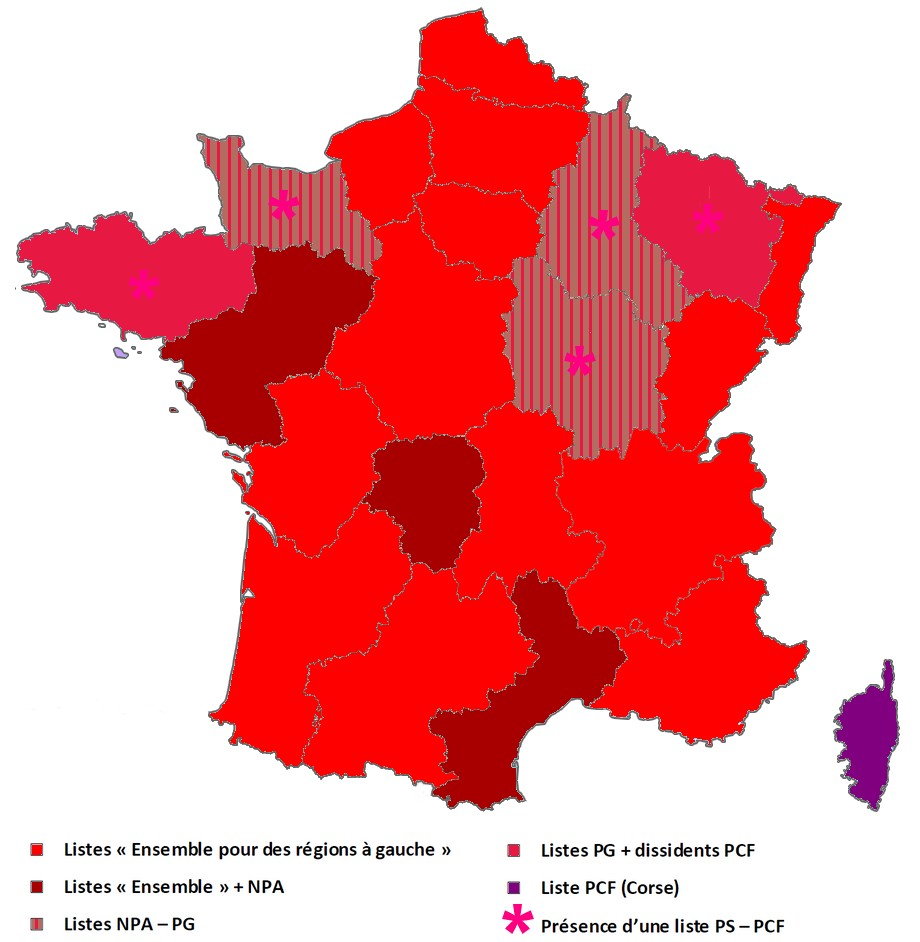 Cartographie de la situation des listes unitaires de la gauche antilibérale au premier tour des élections régionales françaises de 2010.